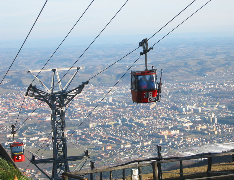 Pohorska_vzpenjača, Pohorje nad Mariborom, Slovenija Foto Andrejj, 29 April 2005